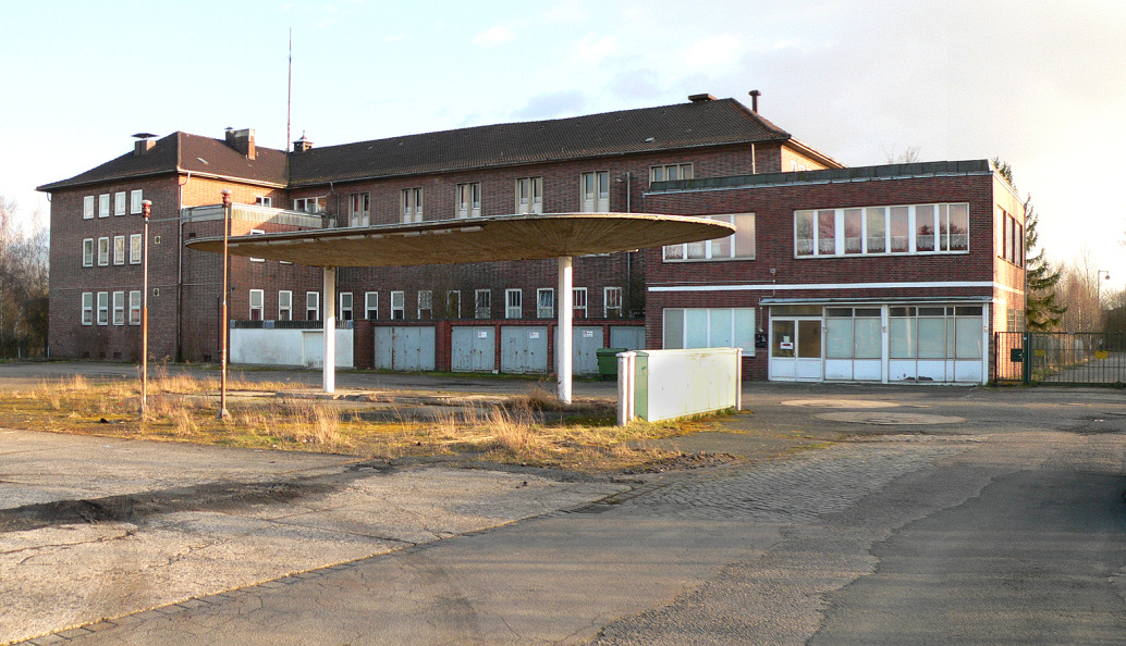 Ehemaliges Deurag Nerag Firmengebäude in Hannover-Misburg